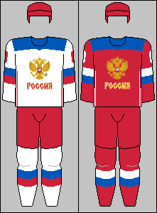 Russian national team jerseys from World Cup of Hockey 2016 ... Big thanks to Realismadder for a large share on these jerseys.